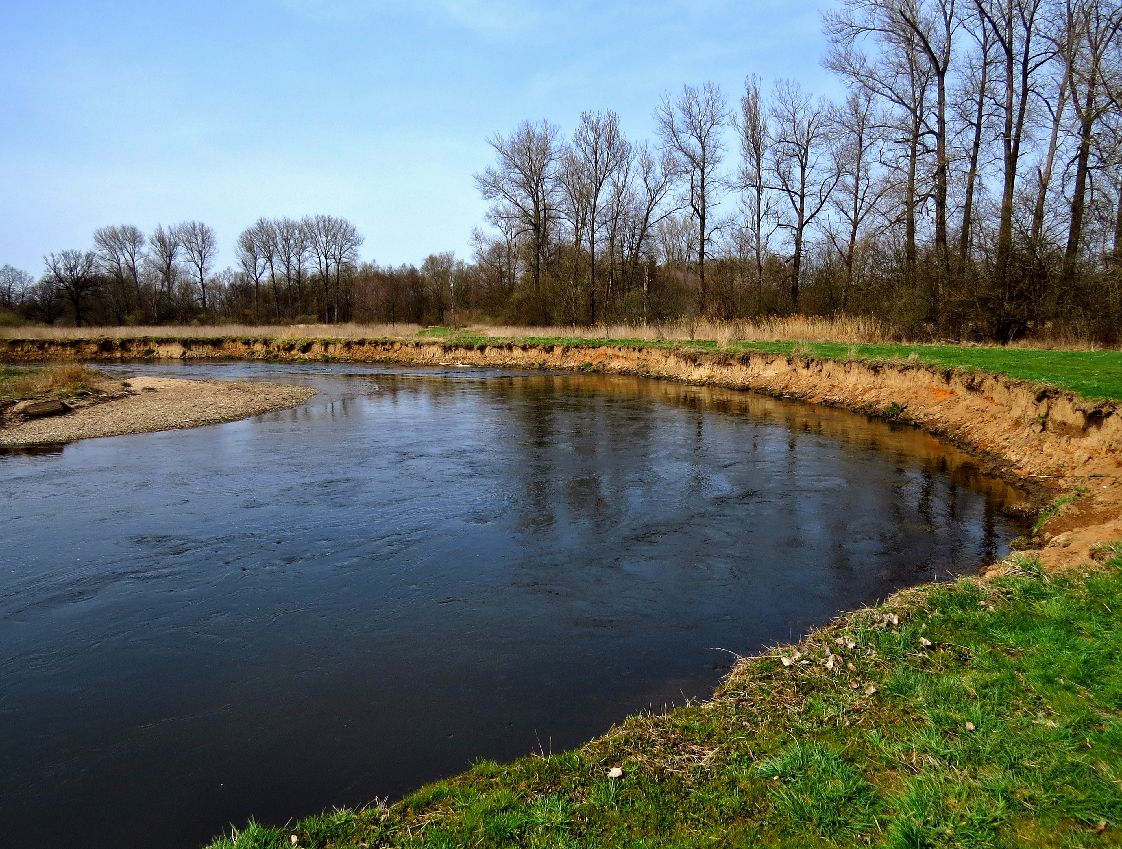 Meandr Orlice v přírodní památce Orlice